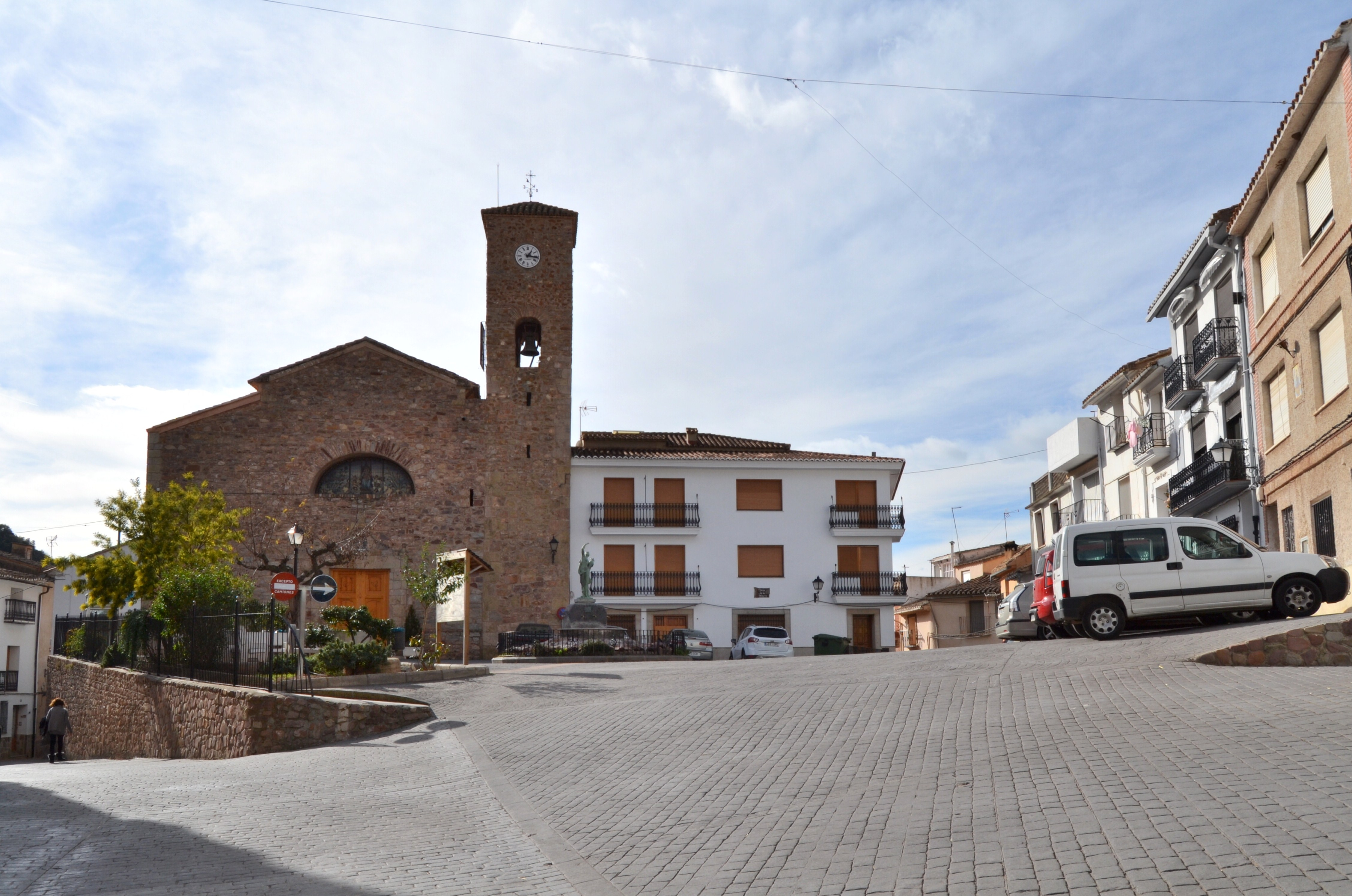 Plaça de l'església d'Almedíxer.